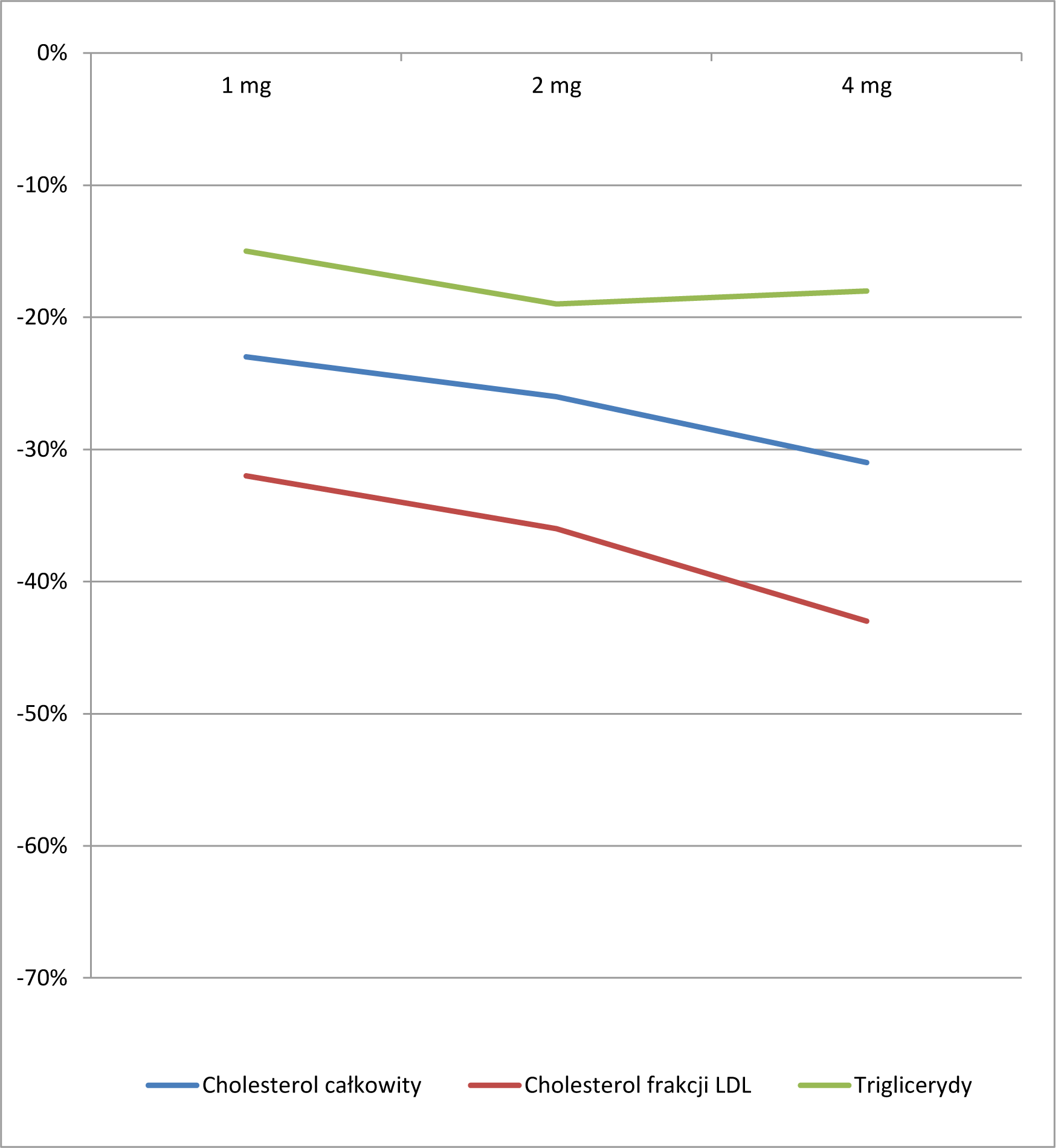 Wpływ pitawastatyny na wskaźniki lipidowe (dane do wykresu za LIVALO (pitavastatin) Tablet, Film Coated for Oral use)